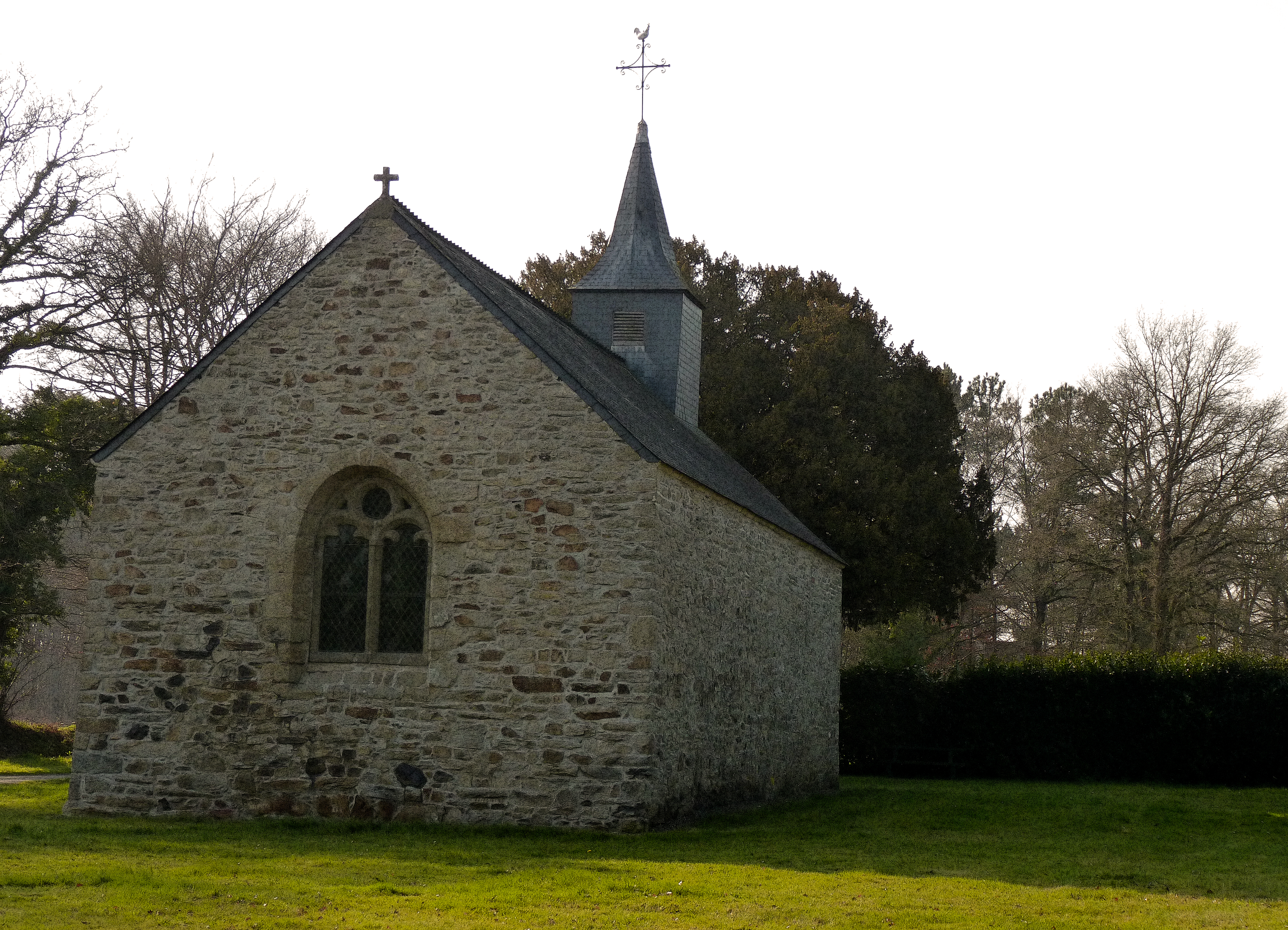 La chapelle Saint-Julien vue de face.